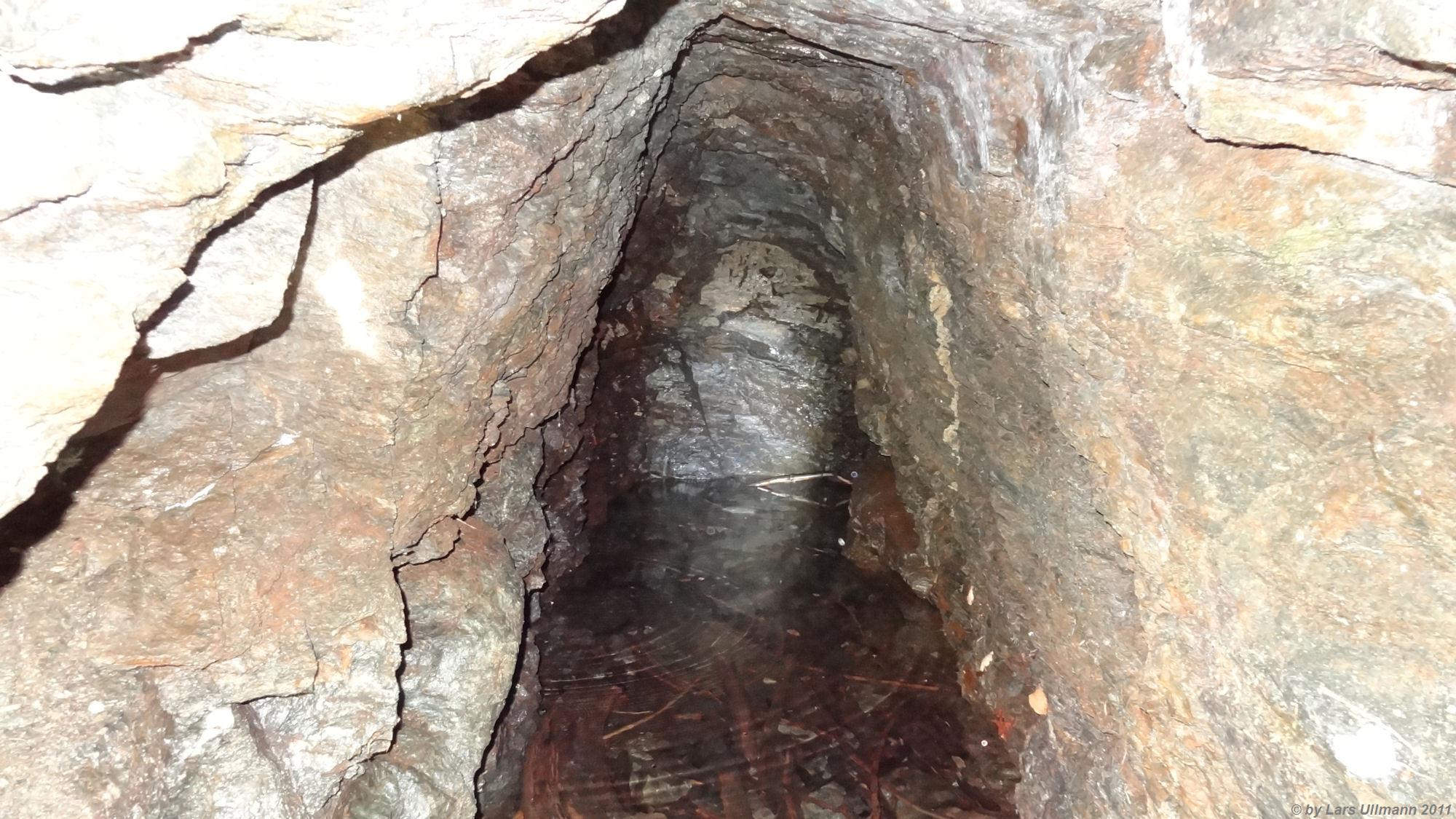 Blick in einen alten Bergbaustollen welcher sich in der Nähe von Erbendorf (Wüstung) bei Crottendorf in Sachsen befindet